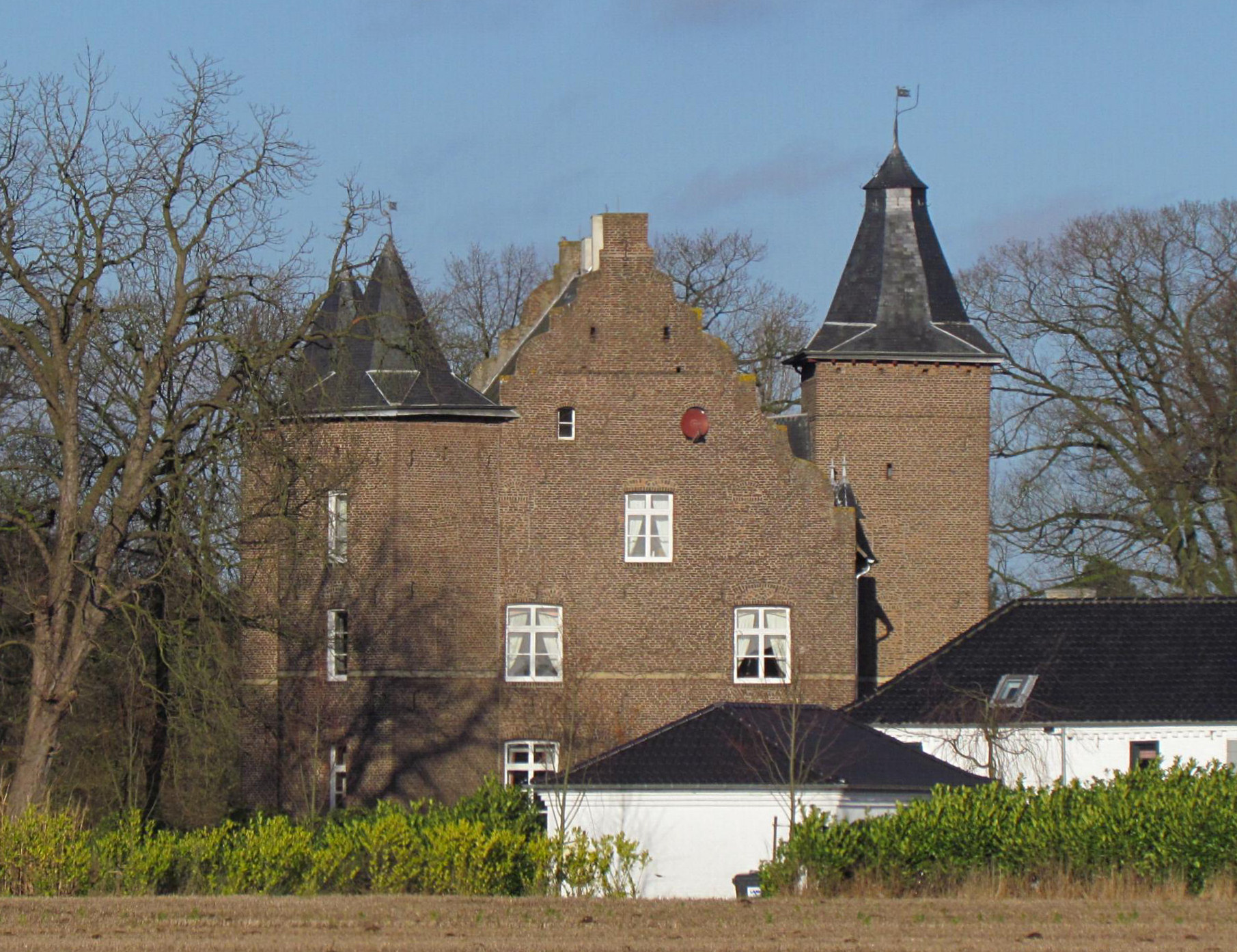 Schloss Effeld in Wassenberg-Effeld, Südansicht